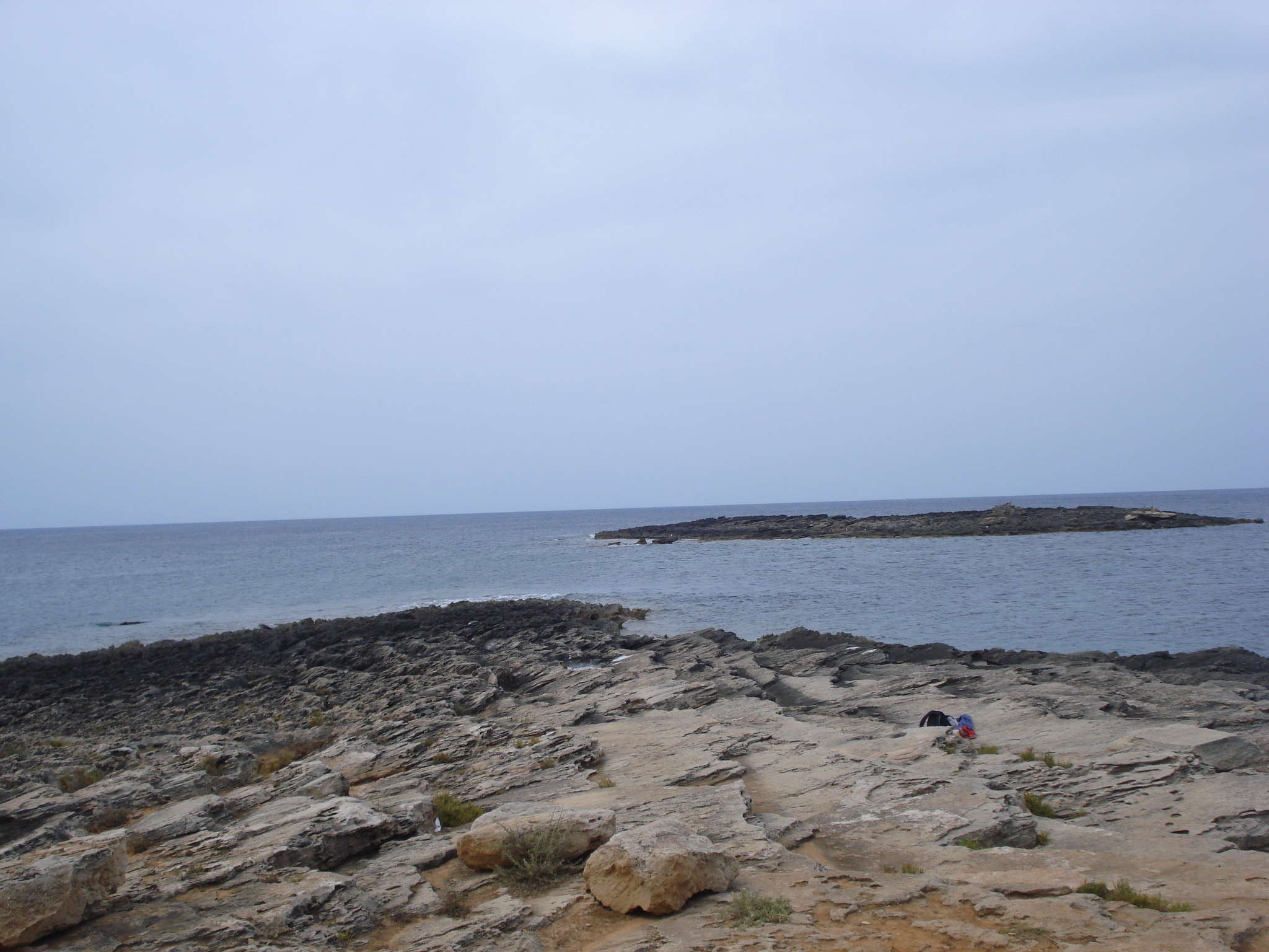 Illot de Na Cabot des de la punta de sa Pedreta (Colònia de Sant Jordi)